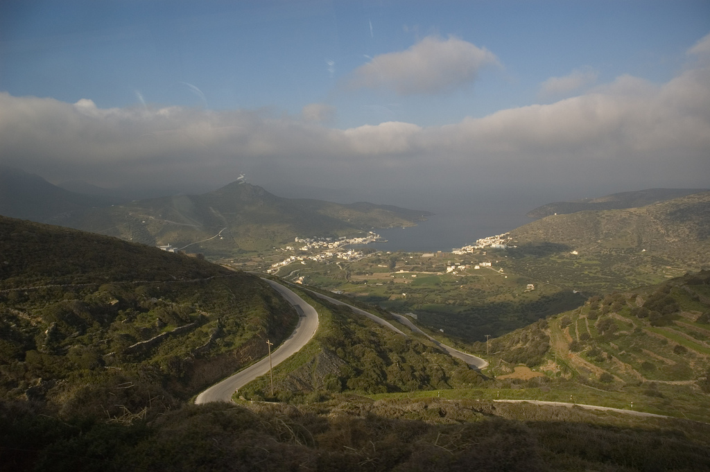 Vue de la baie et du port de Katapola (Amorgos - Cyclades - Grèce)